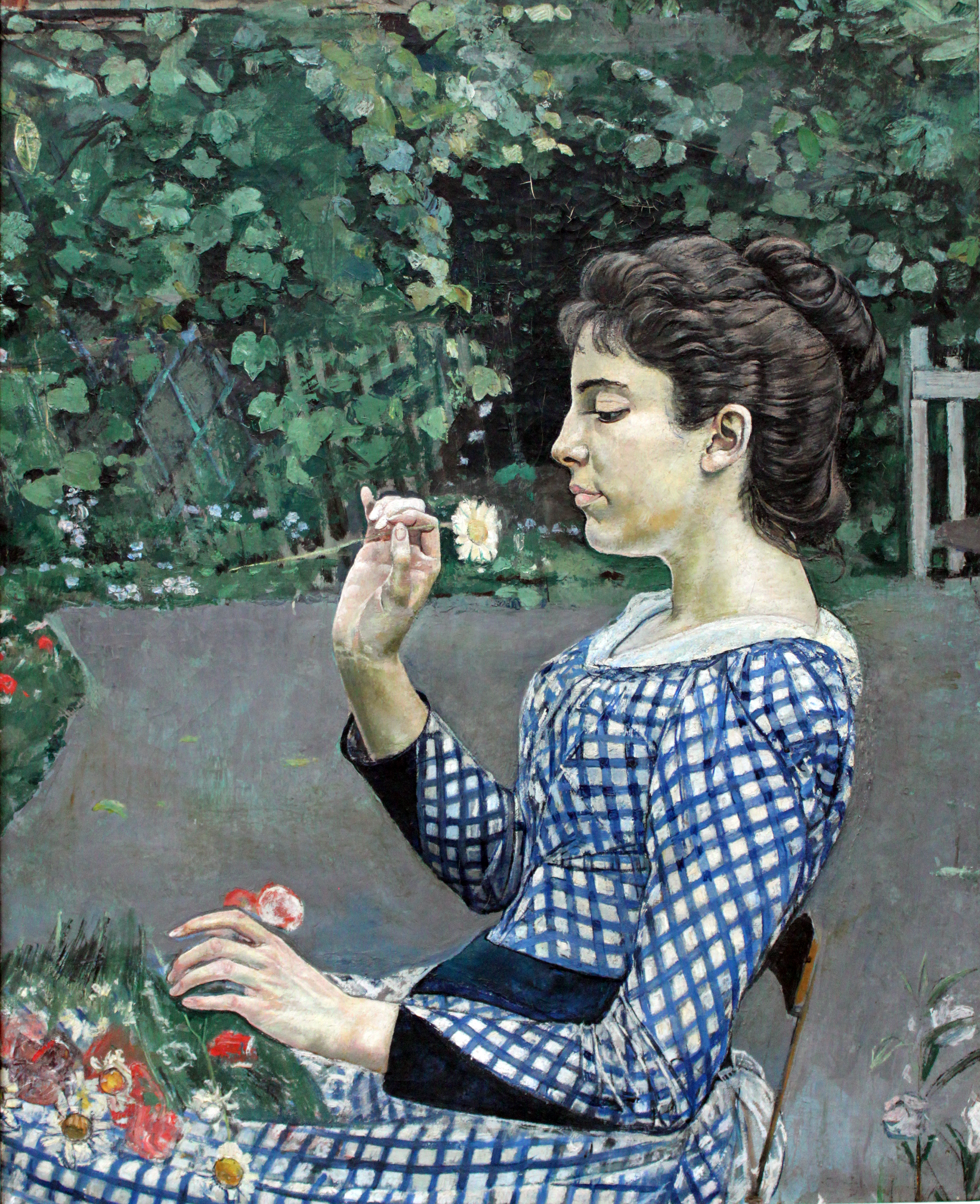 Portrait of Hélène Weiglé